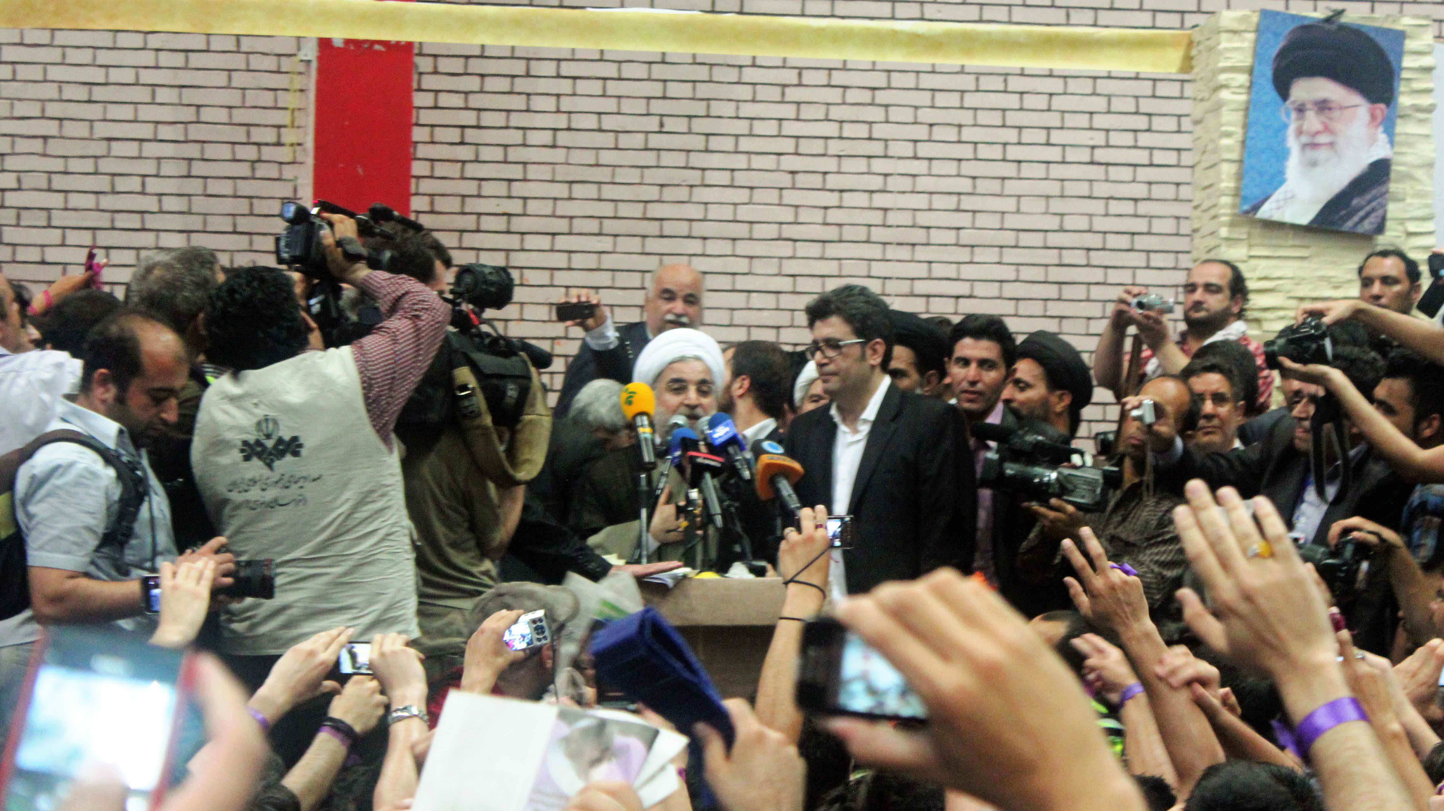 رضا رشیدپور در سفر انتخاباتی حسن روحانی به مشهد در تاریخ ۲۲ خرداد ۱۳۹۲